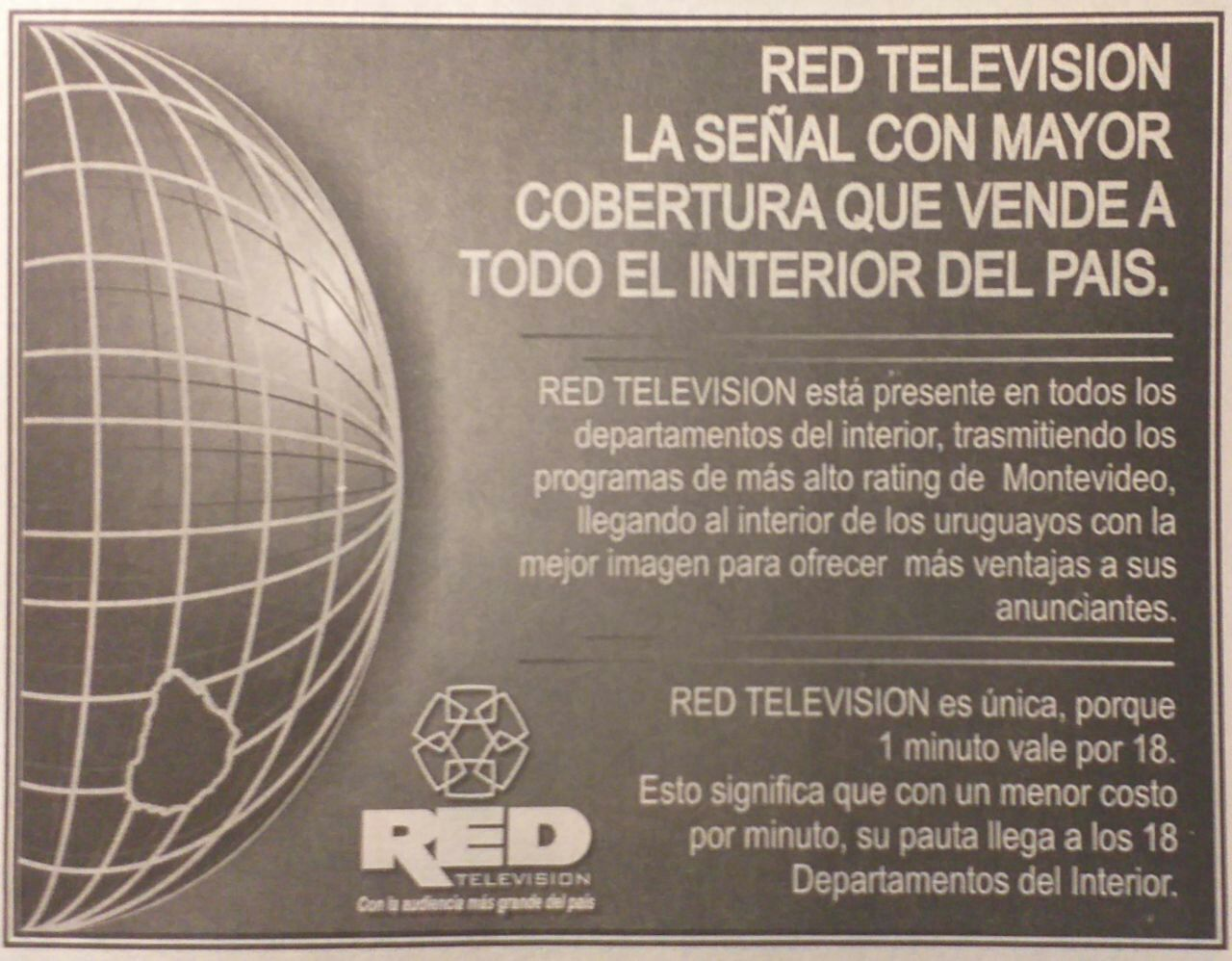 Archivo cedido por Lucas Penadés. Publicidad gráfica de La Red en julio de 2003, publicada en El País.